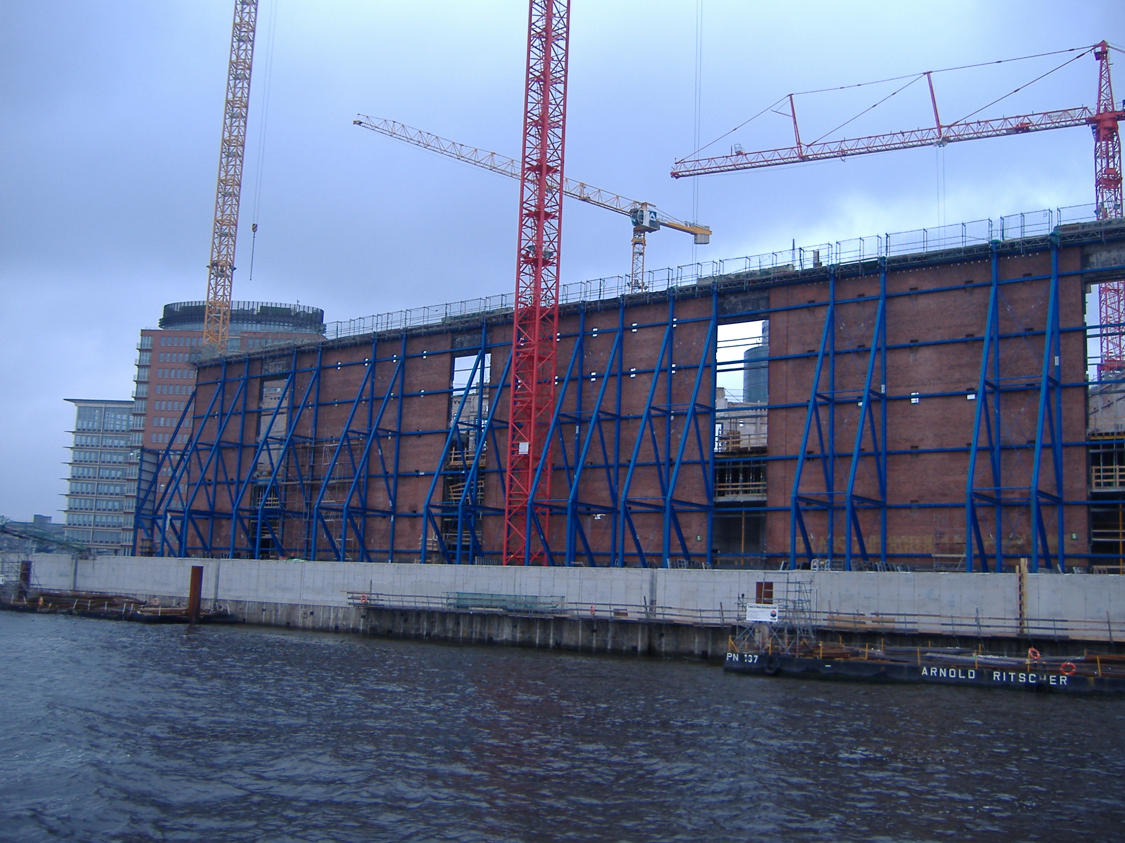 Grundmauern der Elbphilharmonie in Hamburg